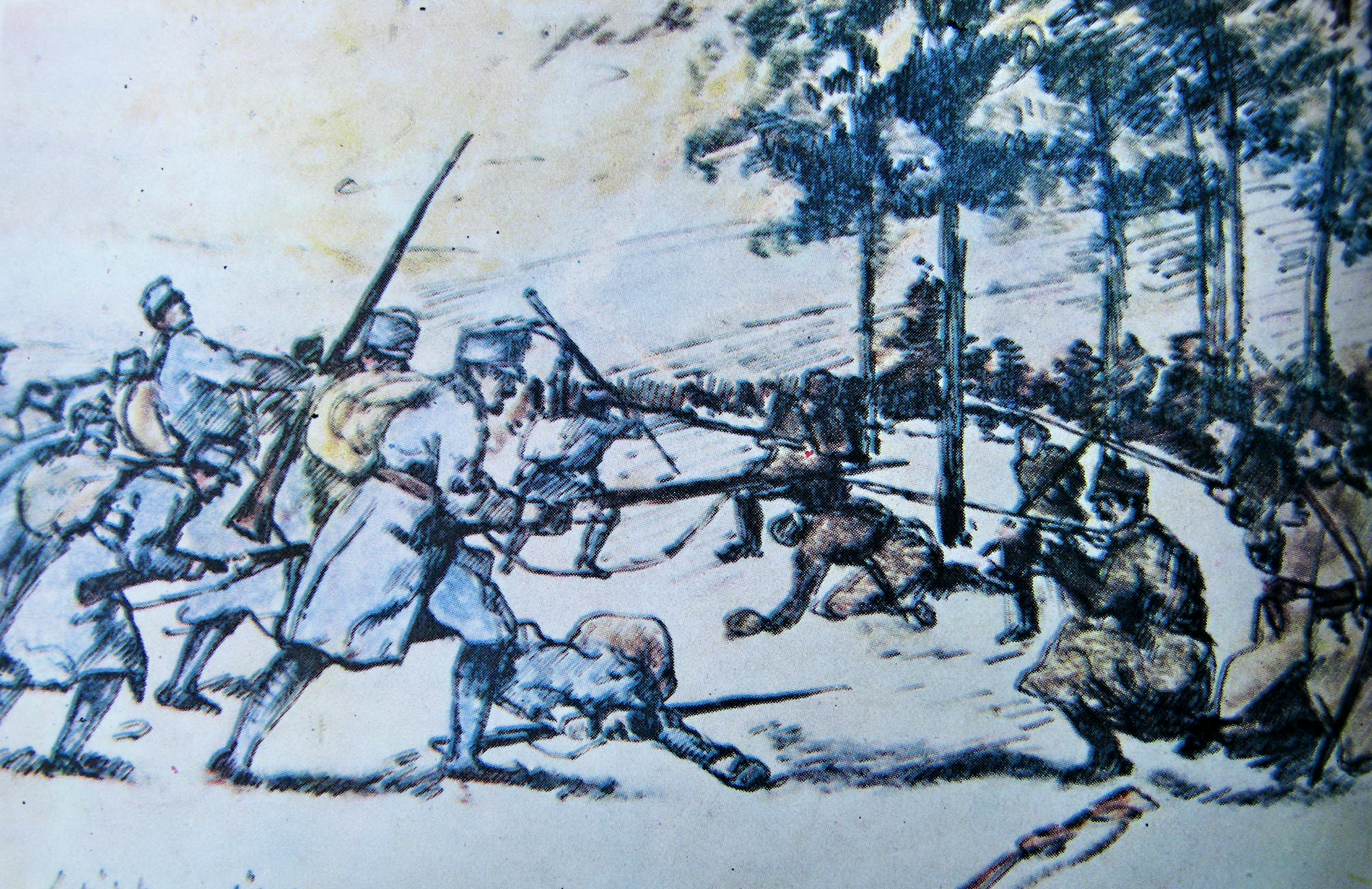 Reproducere după desenul "Respingerea unui atac austro-ungar" - de I. Bughardt (din 1916)